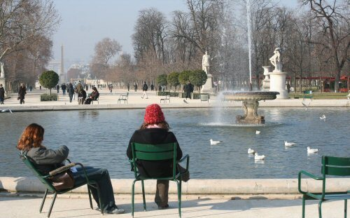 Tuileries Paris (France) photo token by M.GASMI.